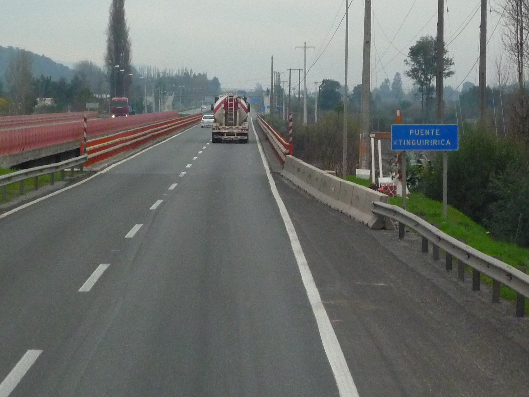 Máquina similar a la accidentada en el Río Tinguiririca, Terminal María Teresa Chillán.